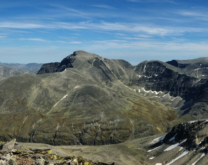 Own work. Summer 2006.